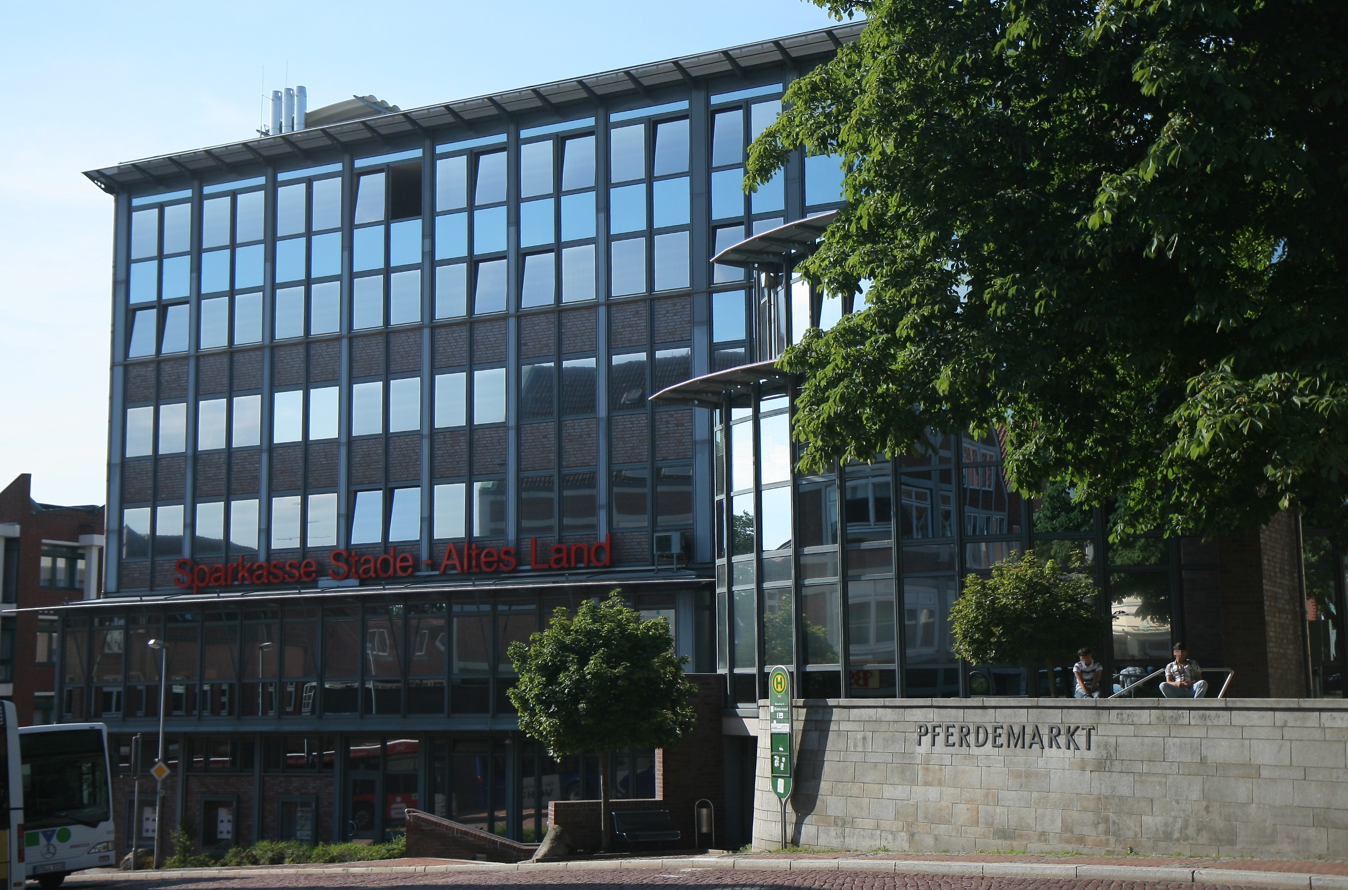 Sparkasse Stade - Altes Land, Pferdemarkt 11 a in Stade.